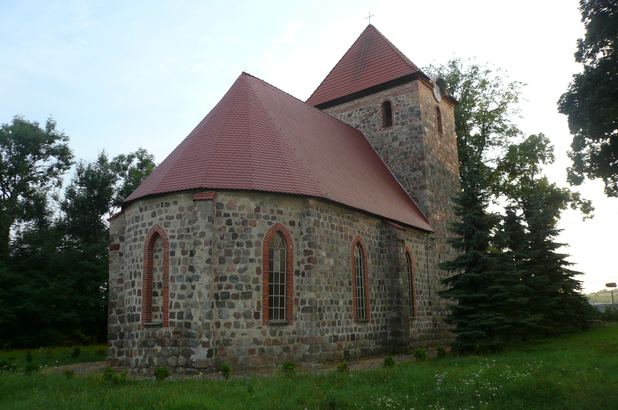 Dolsko - rzymskokatolicki kościół filialny p.w. św. Elżbiety, 2 poł. XIII